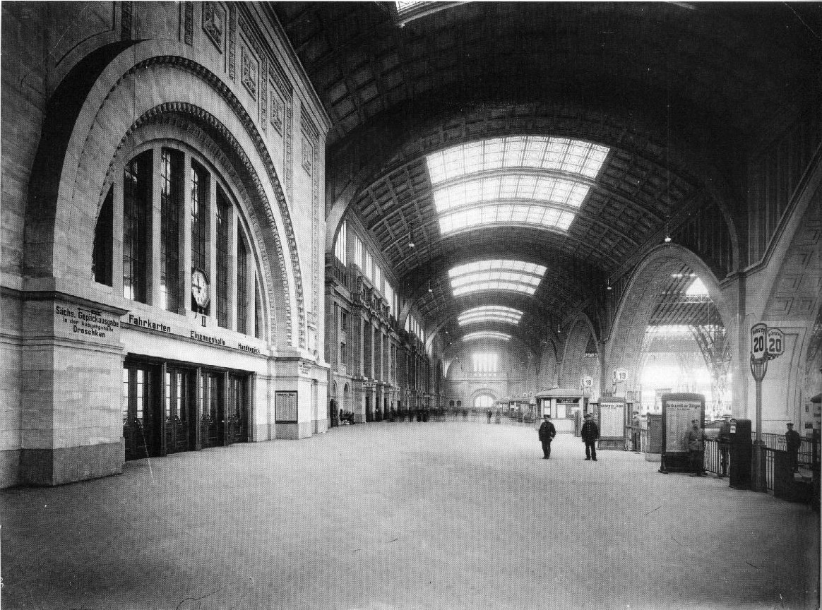 Querbahnsteig Hauptbahnhof Leipzig im Jahre 1916.